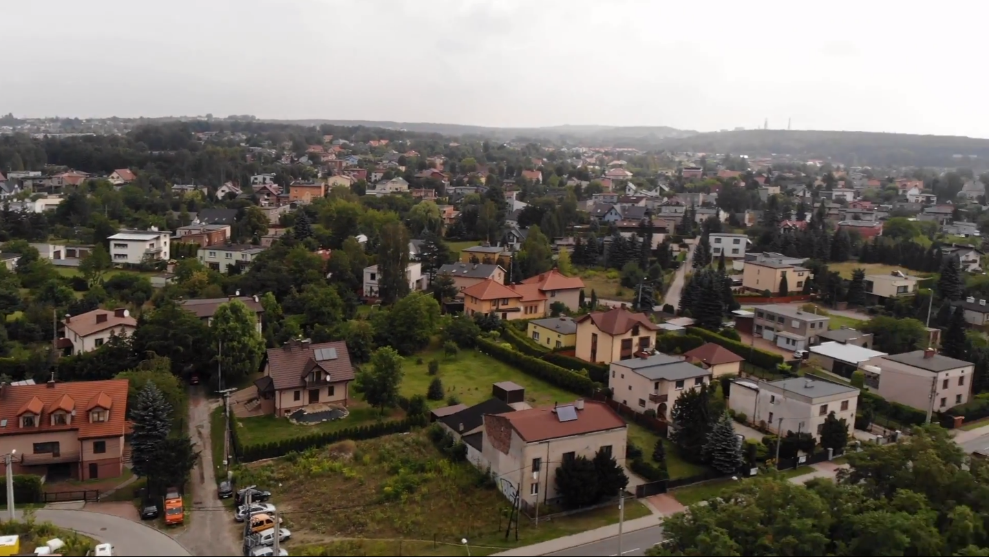 Widok na dzielnicę Podlesie z drona.